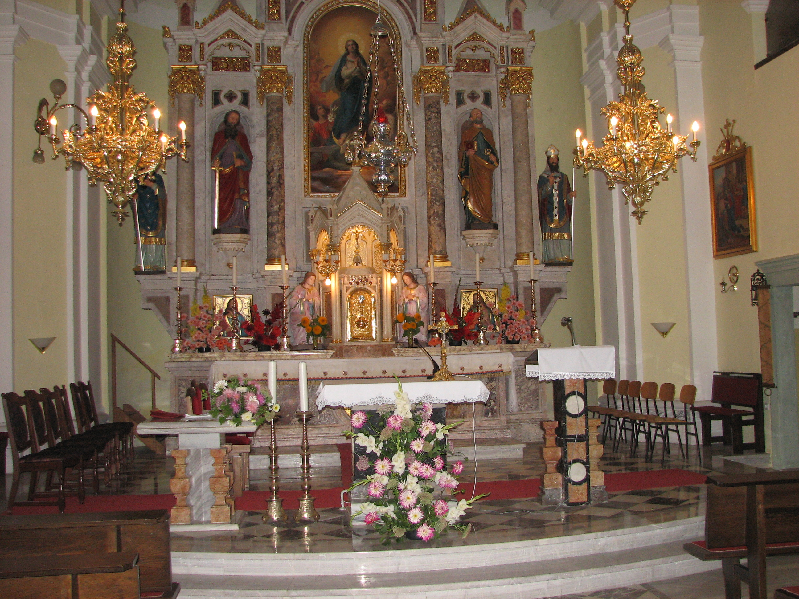 Predoslje pri Kranju, prezbiterij cerkve Sv. Siksta. Urejen 1822 - 1825/26.[1]